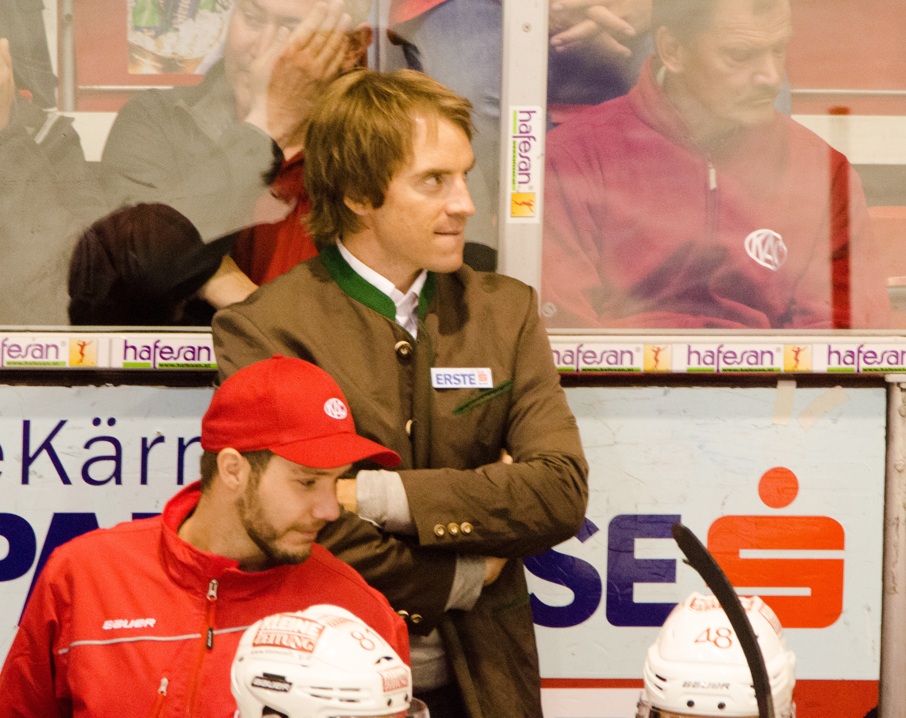 300 Kärntner Derby